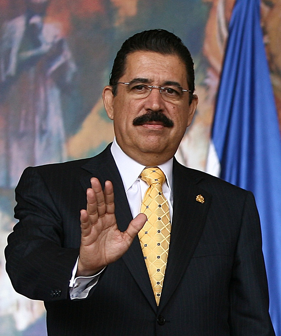 José Manuel Zelaya Rosales, President of Honduras, in Tegucigalpa during a state visit of Brazils president Luiz Inácio Lula da Silva.